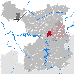 Volkmannsdorf in Thuringia - Saale-Orla-Kreis